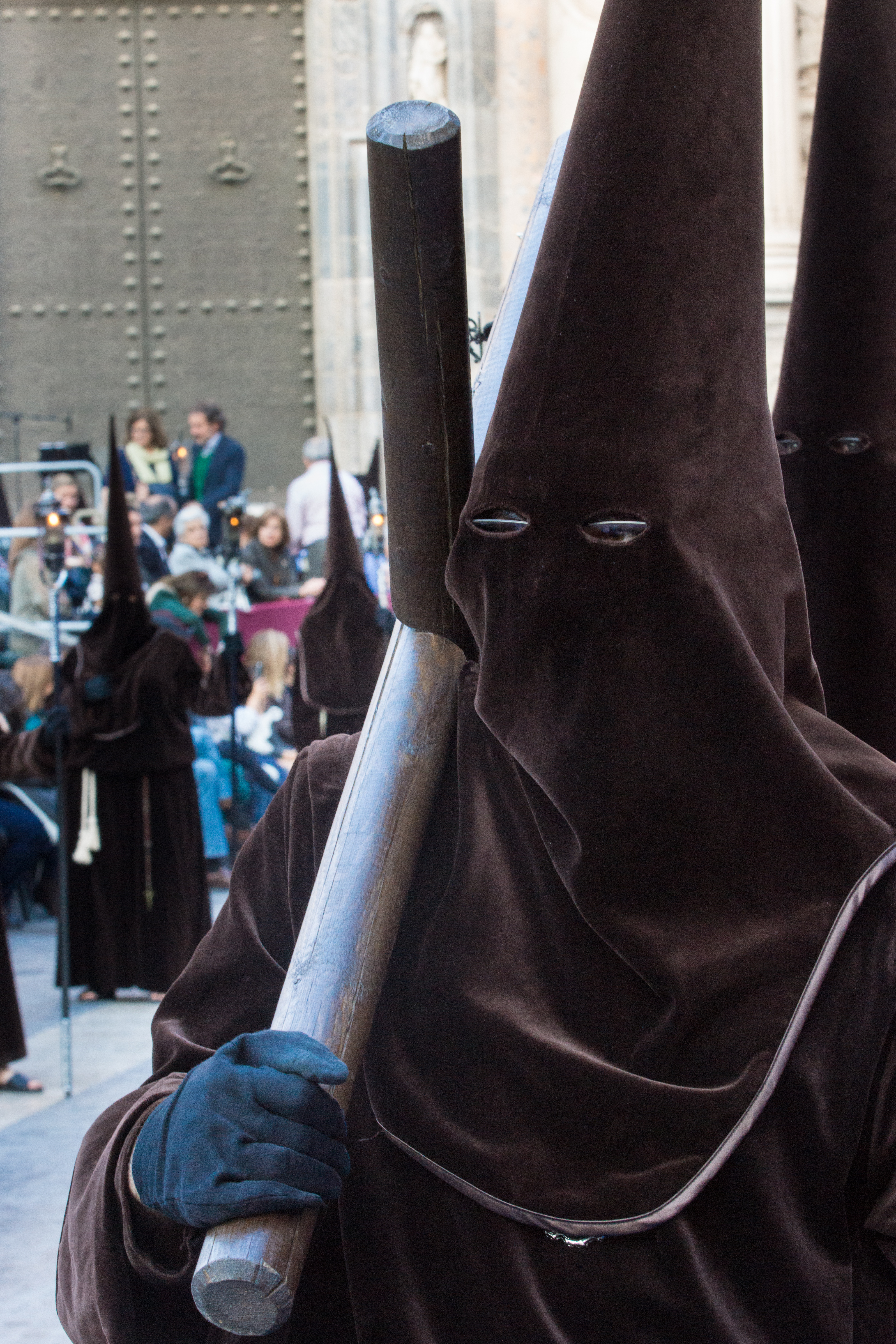 Cofrade del Cristo de la Fe This is a photography of a Folklore festival in Spain (Wikidata id Q5685566).